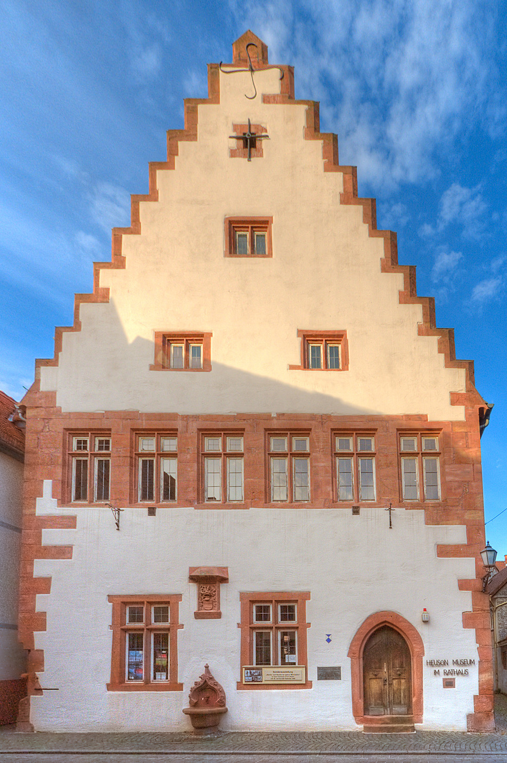 Das Historisches Rathaus in Büdingen.